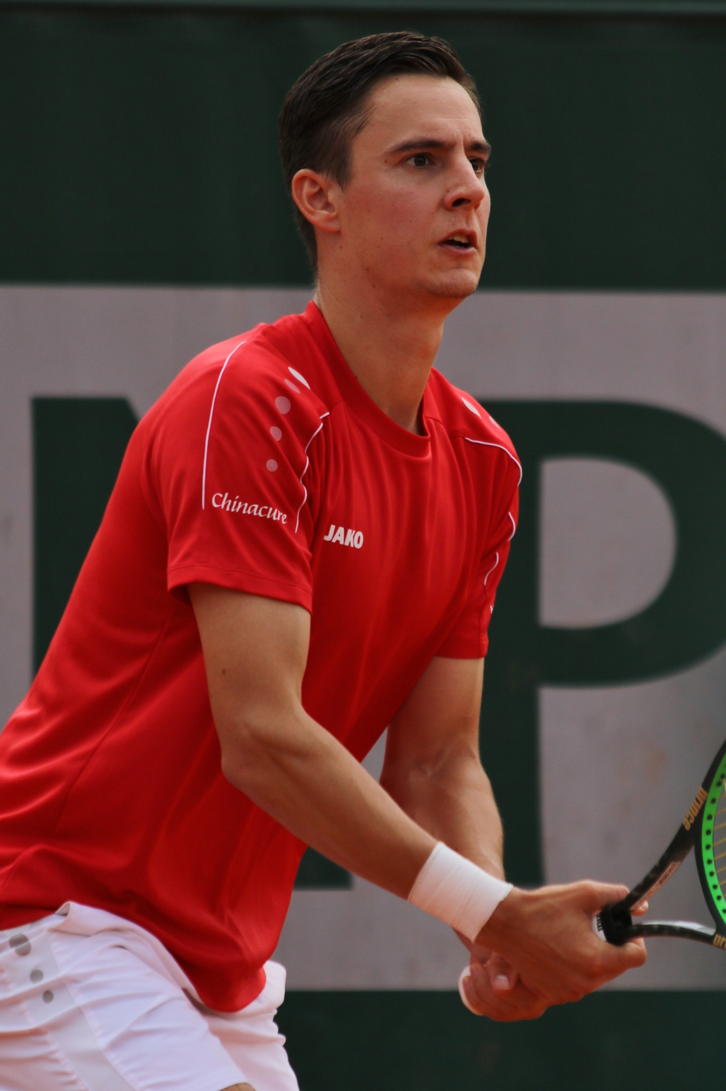 Vliegen RG19 (25)